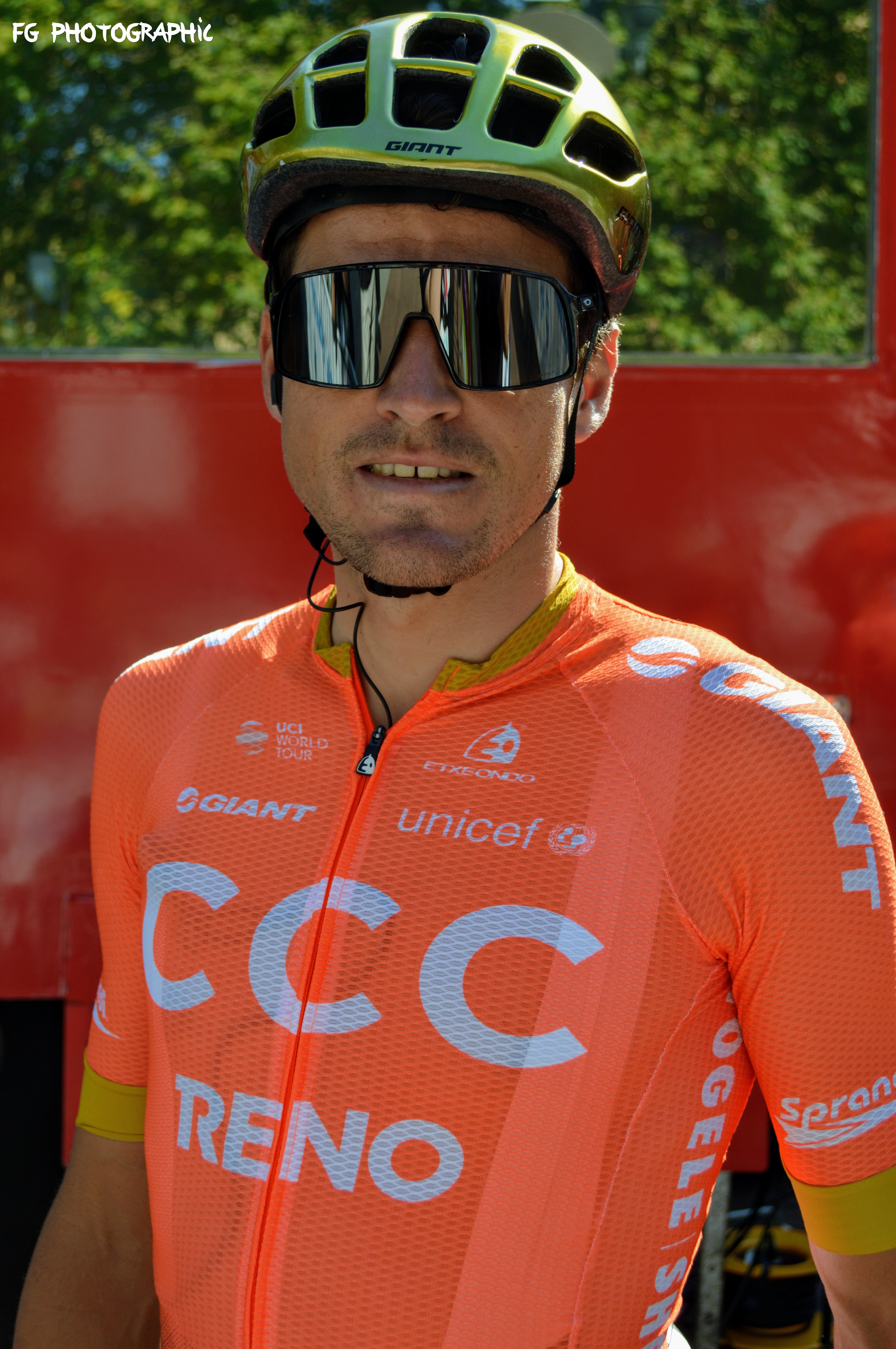 Greg VAN AVERMAET - Août 2019 (Clasica San Sebastian)